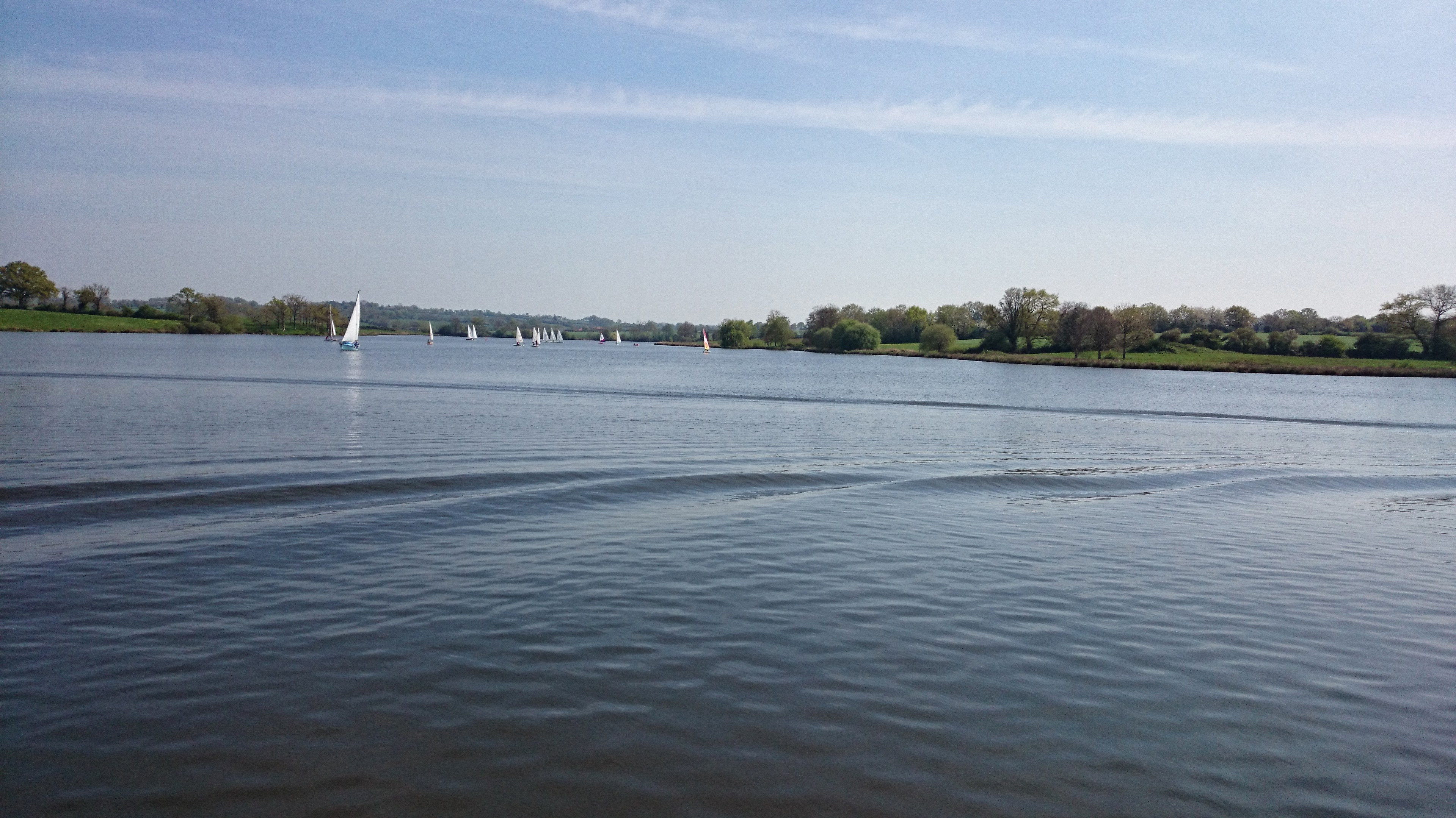 Vu sur le LAC DE RIBOU